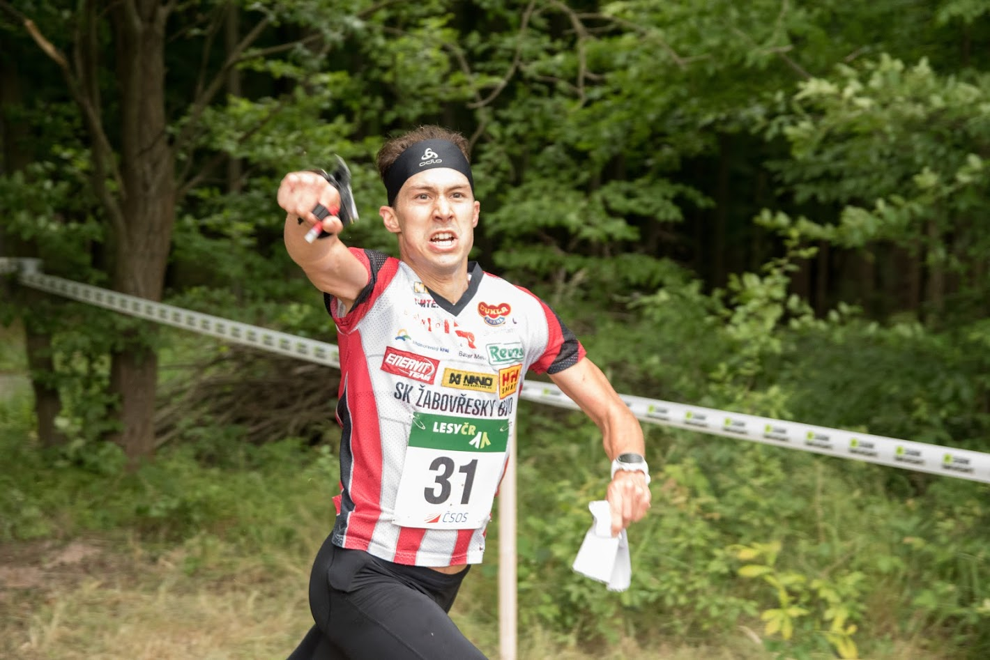 MČR KT 2018